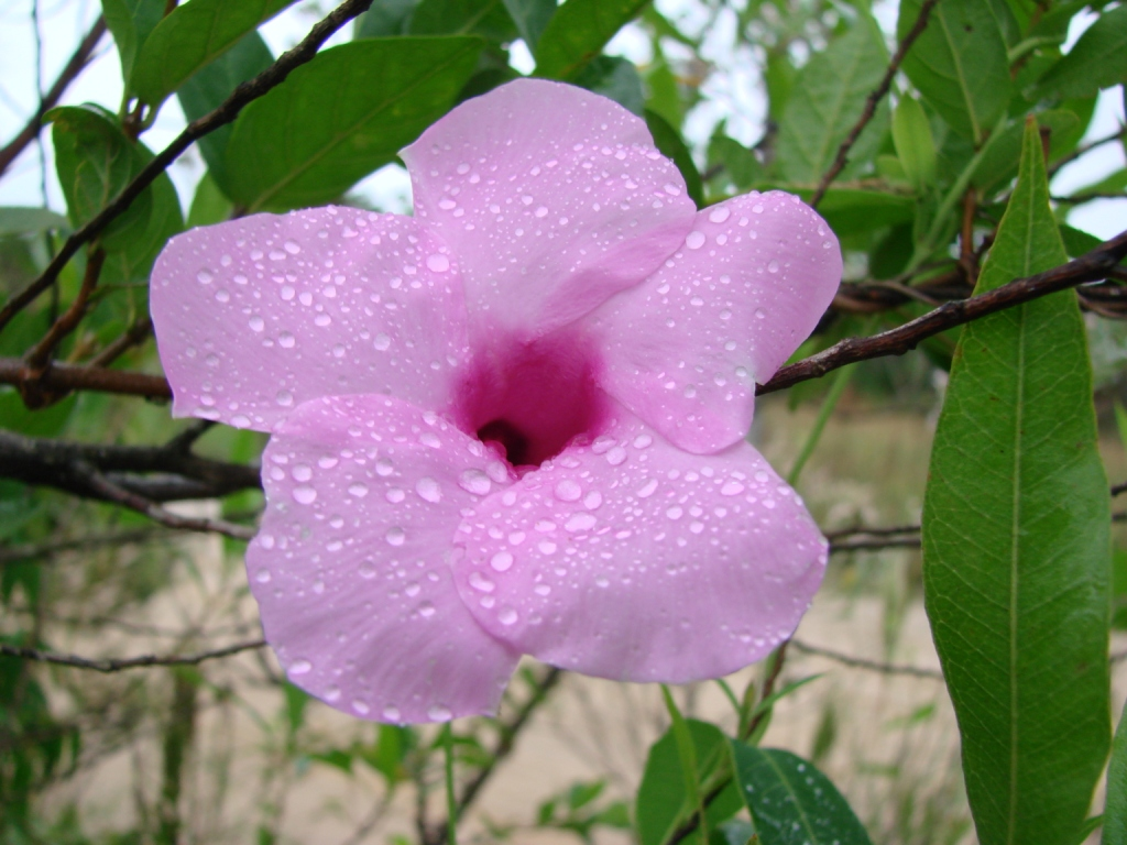 Rhabdadenia pohli - APOCYNACEAE - Praia do Sonho - Palho�a - SC - Brasil